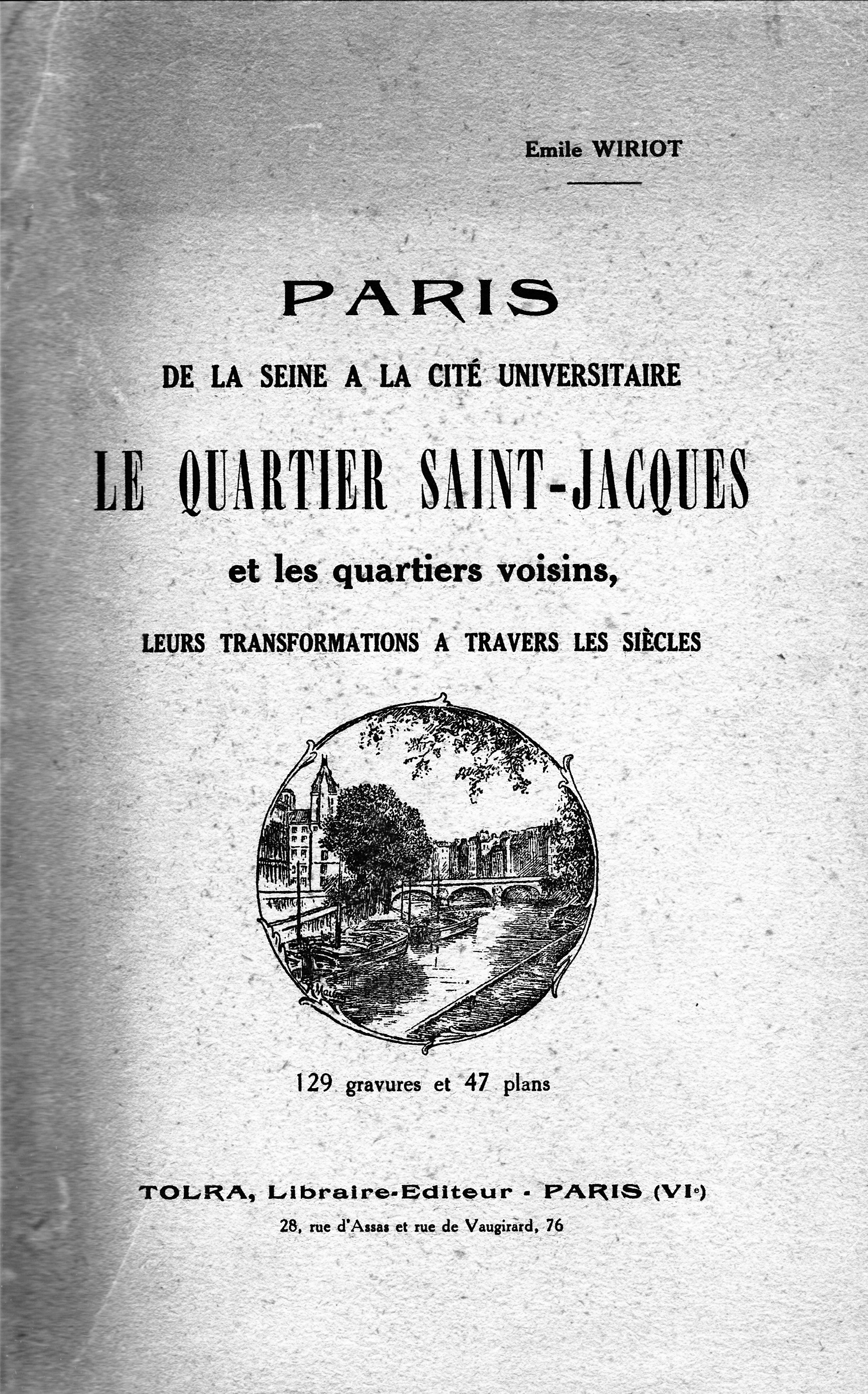 Couverture du livre : Paris de la Seine à la Cité universitaire: Le Quartier Saint-Jacques et les quartiers voisins, leurs transformations à travers les siècles., Paris, Tolra, 1929, 623 p.